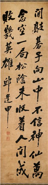 中文（香港）: 丘逢甲的書法作品，内容為“闲敲棋子向山中，不信神仙万念空。一局松阴未收着，人间成败几英雄。”